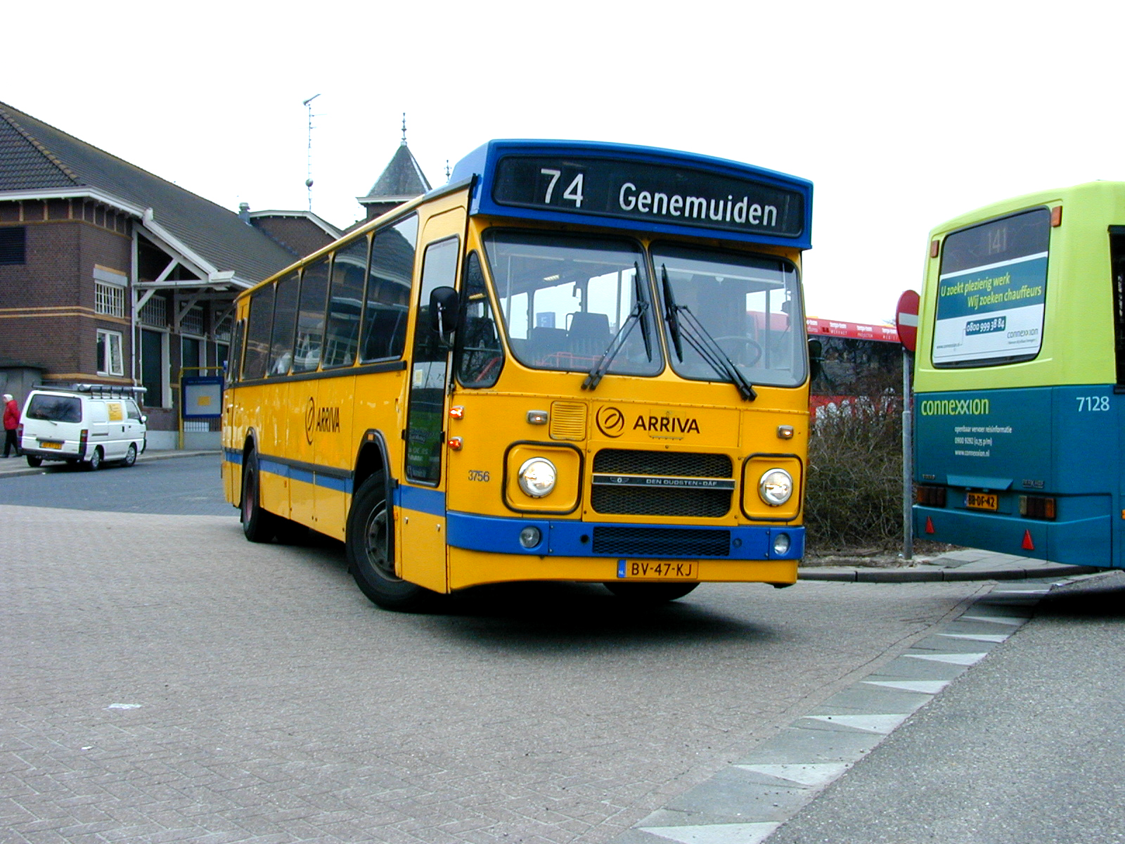 Arriva bus 3756 van het type DAF MB200DKDL600/Den Oudsten te Kampen.